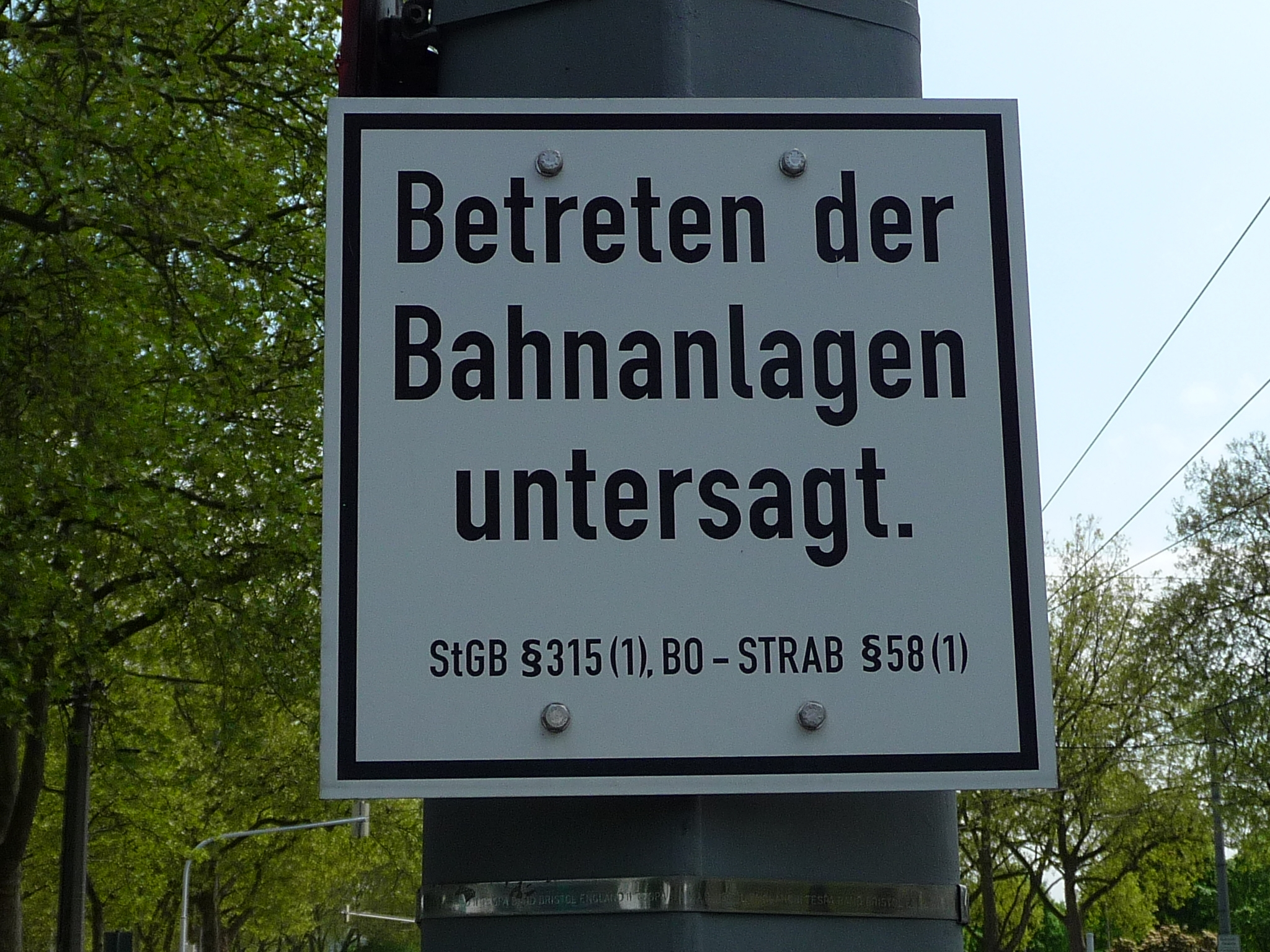 Verbotsschild gem. § 58 Absatz 1 der Verordnung über den Bau und Betrieb der Straßenbahnen (BO-STRAB), fotografiert in Mannheim